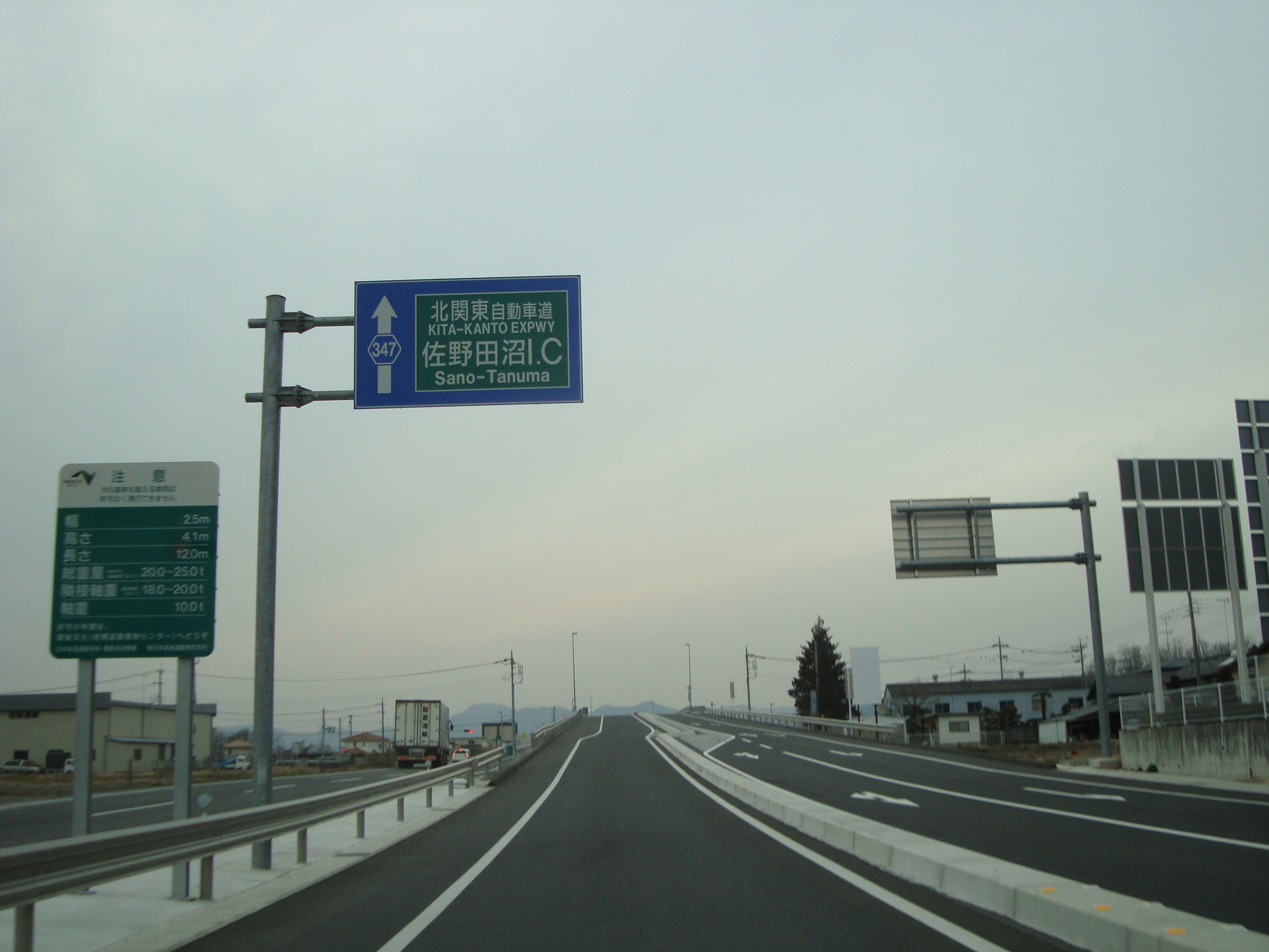 栃木県道347号 佐野田沼インターチェンジ線 栃木県佐野市吉水町